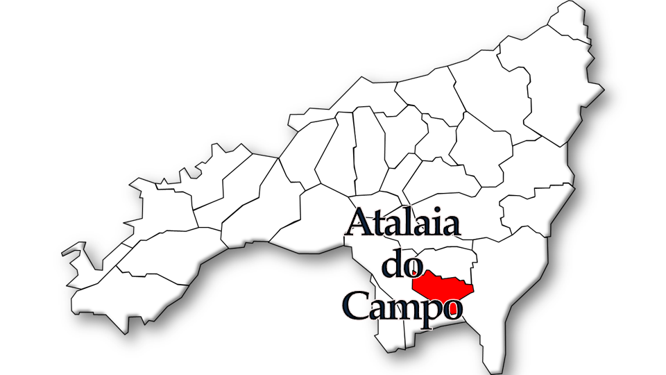 População